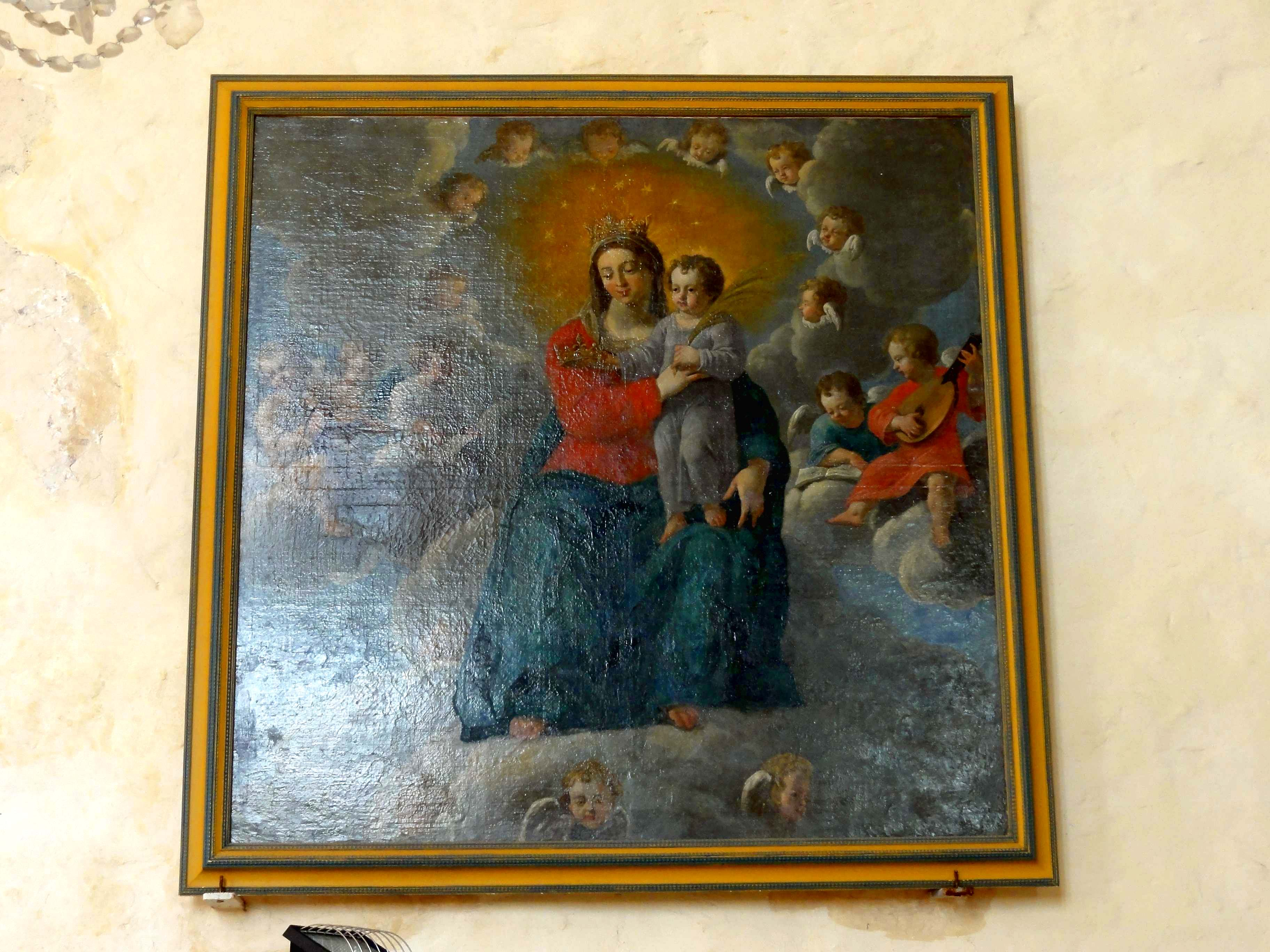 Tableau - La Vierge à l'Enfant entourée d'anges musiciens, de l'entourage de Philippe de Champaigne, XVIIe siècle.